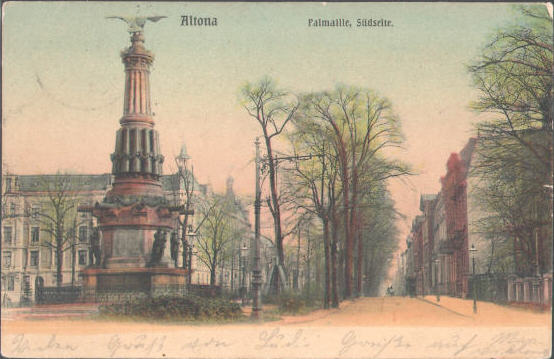 Siegessäule auf der Palmaille in Altona, Ansichtskarte von 1907